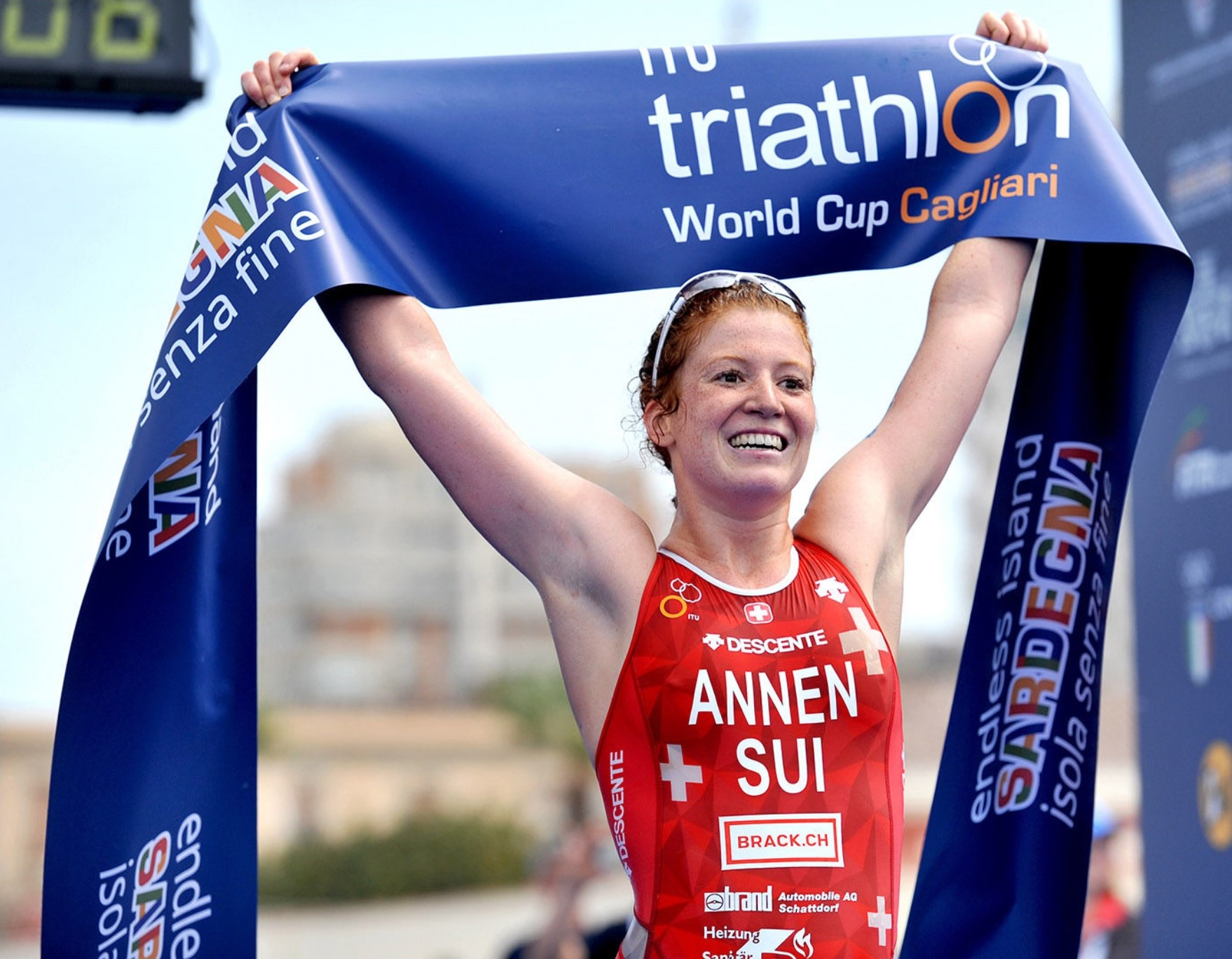 Jolanda Annen gewinnt am 4. Juni 2017 den Triathlon Weltcup in Cagliari